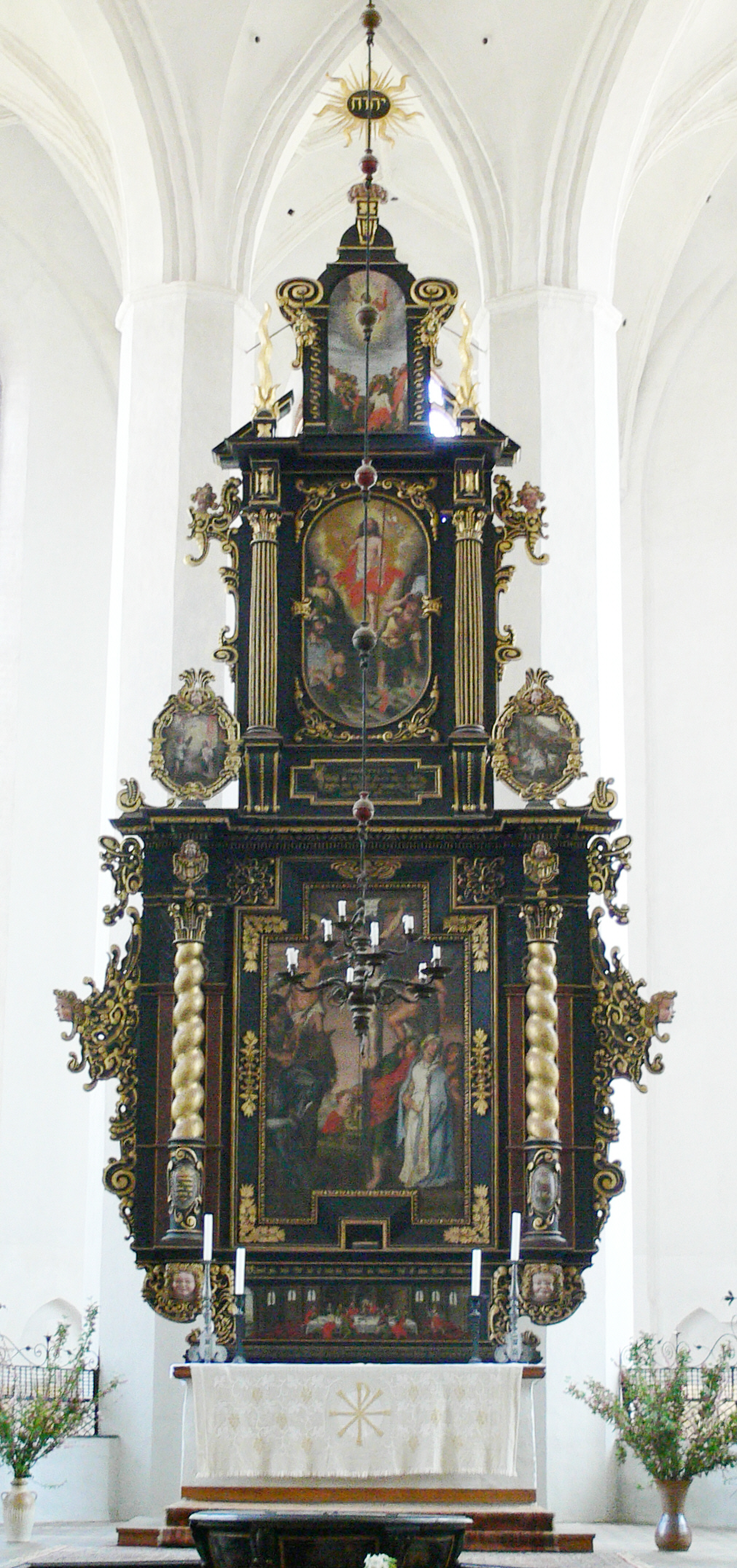 Luckau, Landkreis Dahme-Spreewald, Brandenburg St..-Nikolai-Kirche Hauptaltar von Abraham Jäger (Tischler) aus Doberlug und Christoph Krause (Maler) aus Großenhain, 1670